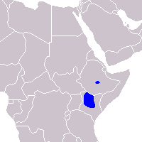 Equus grevyi distribution map